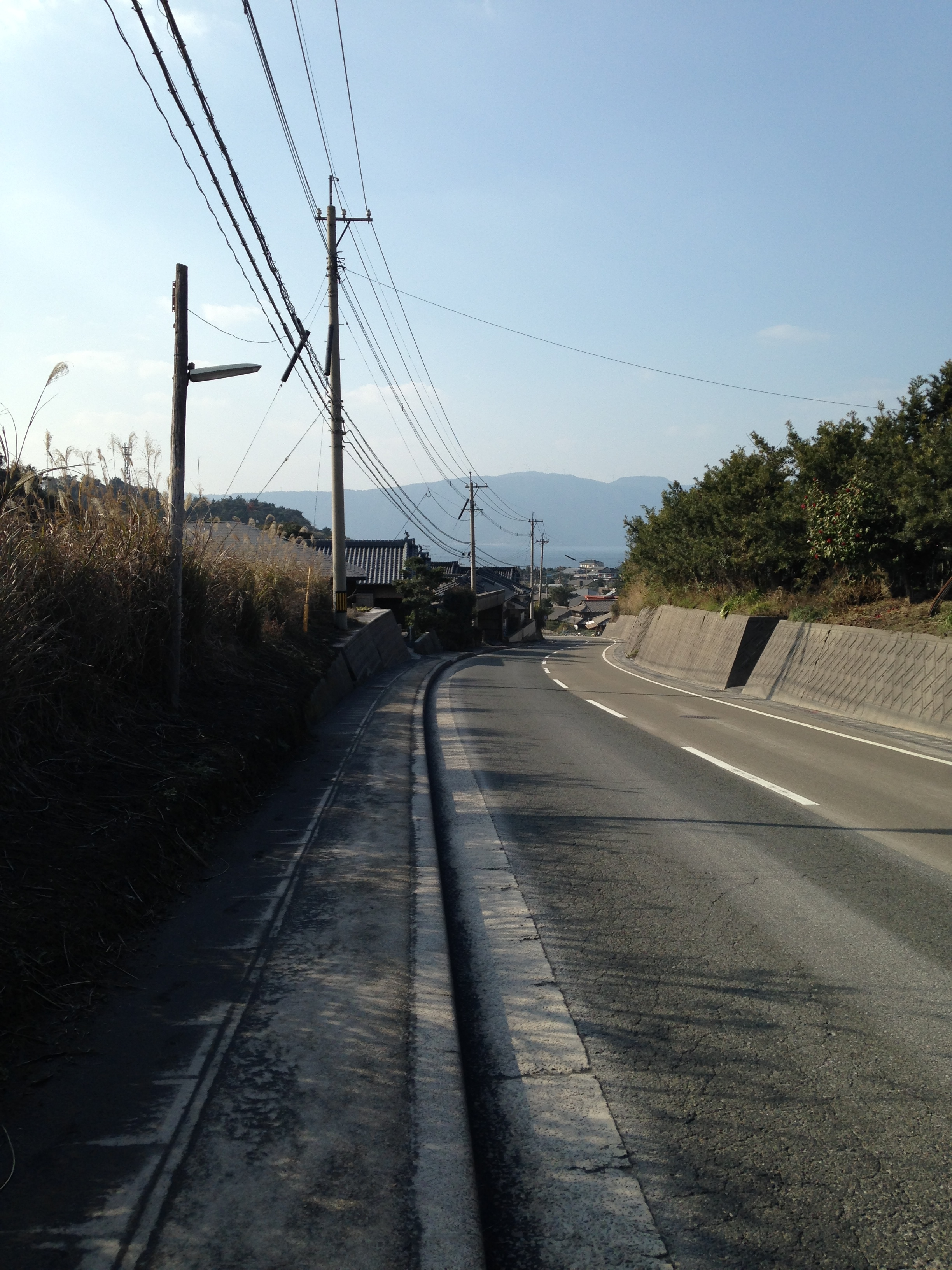 桜島・鹿児島県道26号と桜島白浜町の遠景